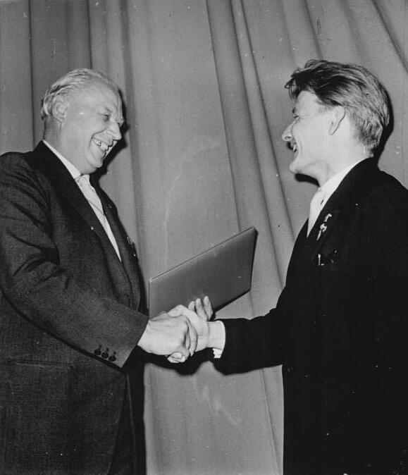 Zentralbild Eckleben 19.6.1961 3. Arbeiterfestspiele des FDGB. Literatur- und Kunstpreis des FDGB 1961 verliehen. Der Literatur- und Kunstpreis des FDGB 1961 wurde anlässlich der 3. Arbeiterfestspiele am 16.6.1961 in der Magdeburger Parkgaststätte "Herrenkrug" verliehen. Die Auszeichnung nahm der Vorsitzende des FDGB-Bundesvorstandes, Herbert Warnke, vor. UBz: Herbert Warnke verleiht Walter Baumert den Literaturpreis des FDGB 1961.